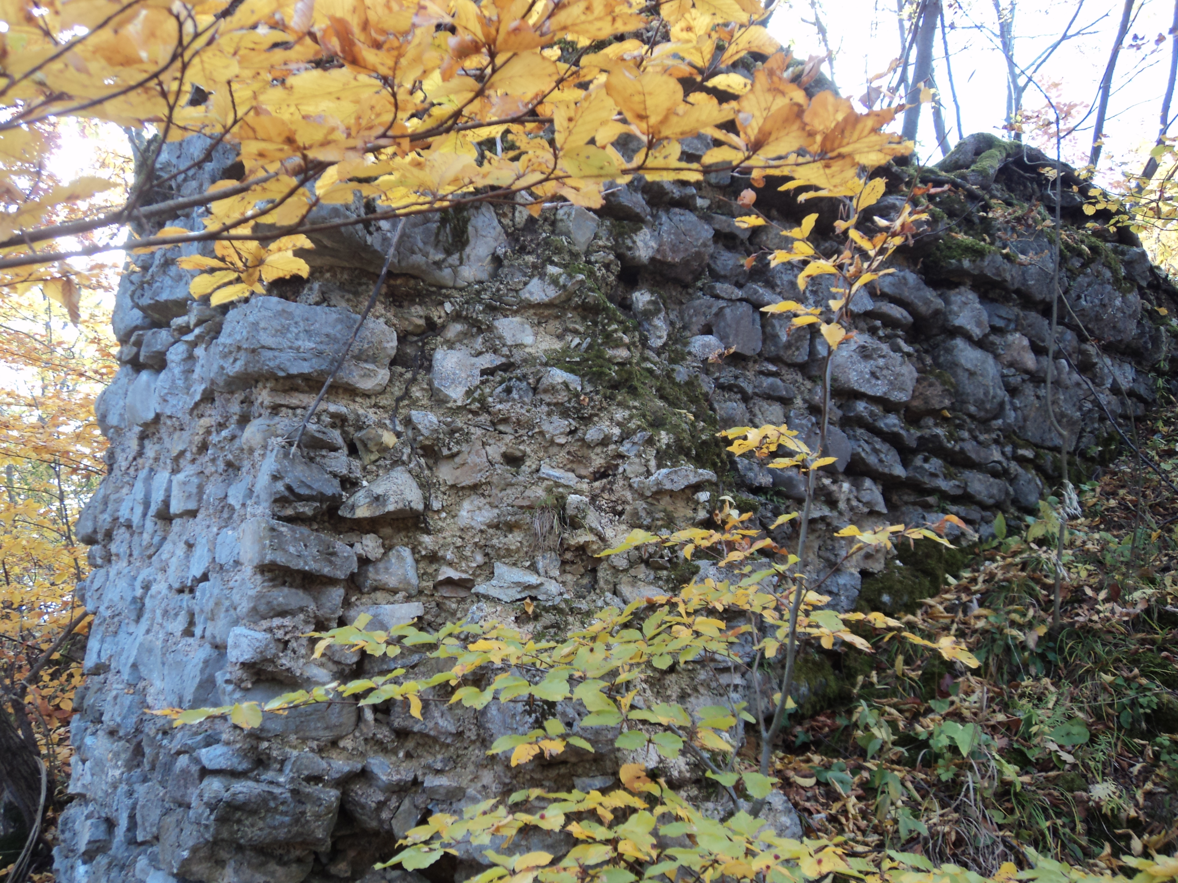 Grad Reštanj VIII. 2011